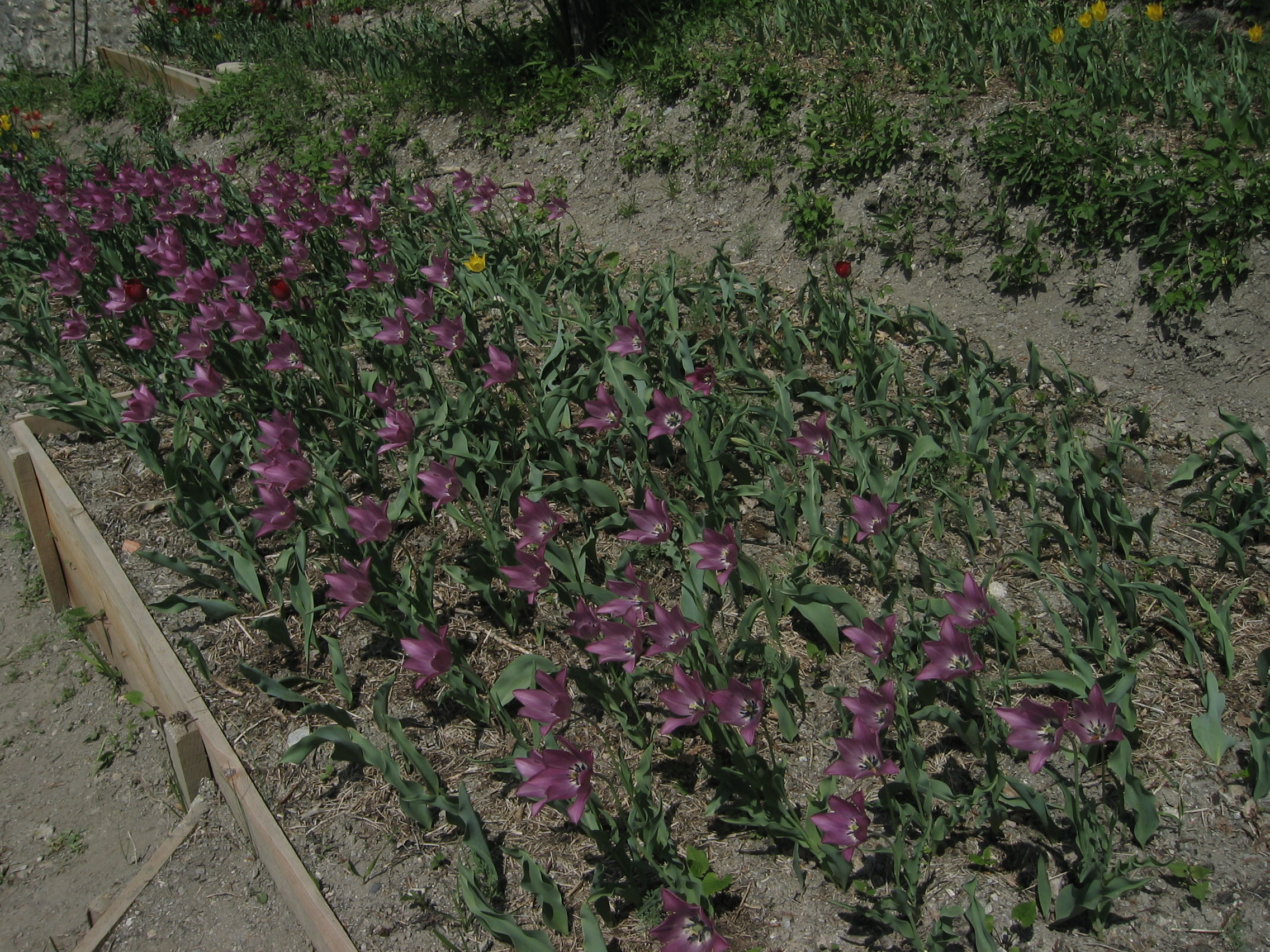 Photographie de la dernière station de Tulipes de Guillestre (Tulipa gesneriana, syn. T. platystigma) dans la ville de Guillestre